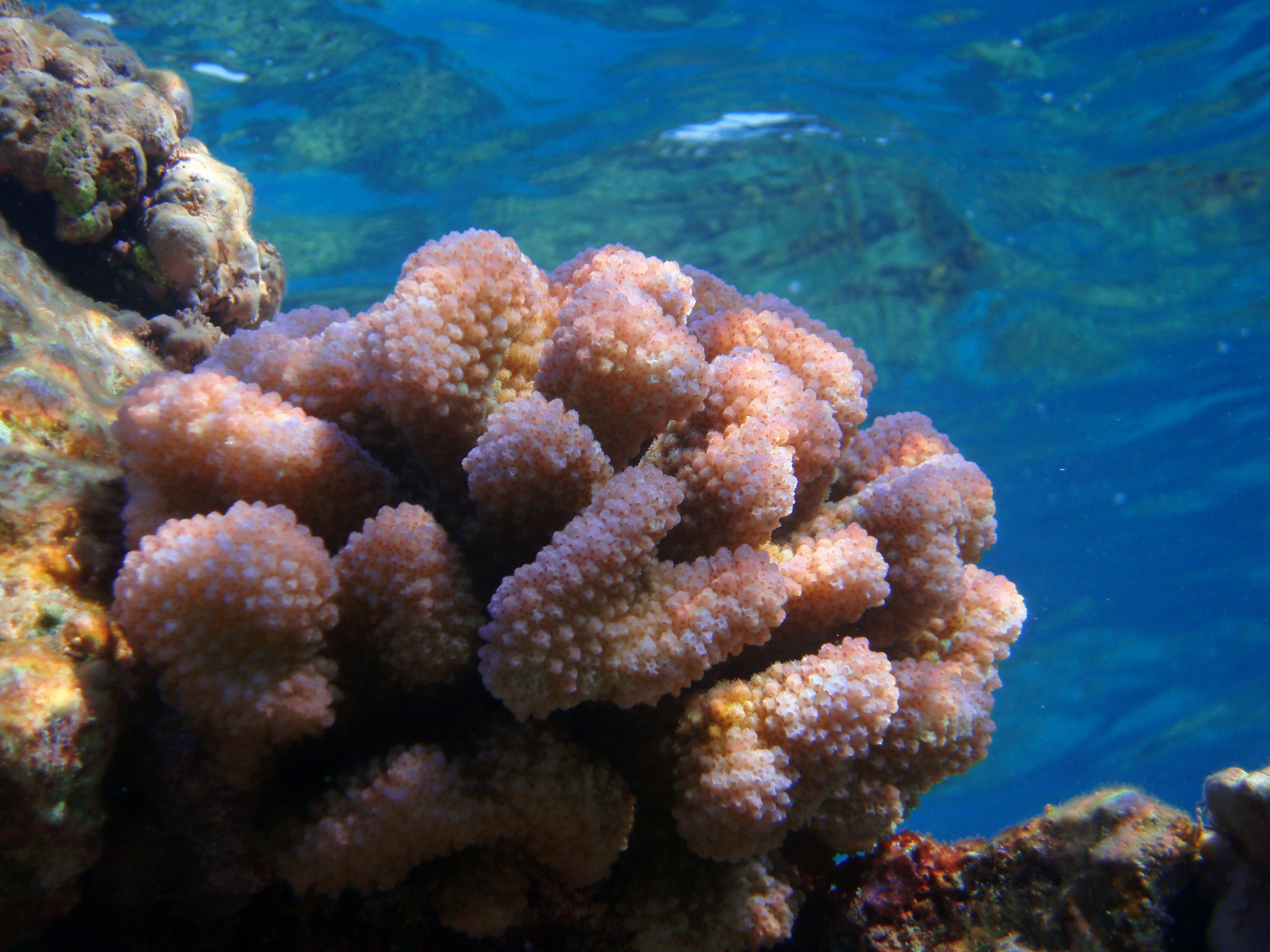 Pocillopora meandrina en French Frigate Shoals, Hawái